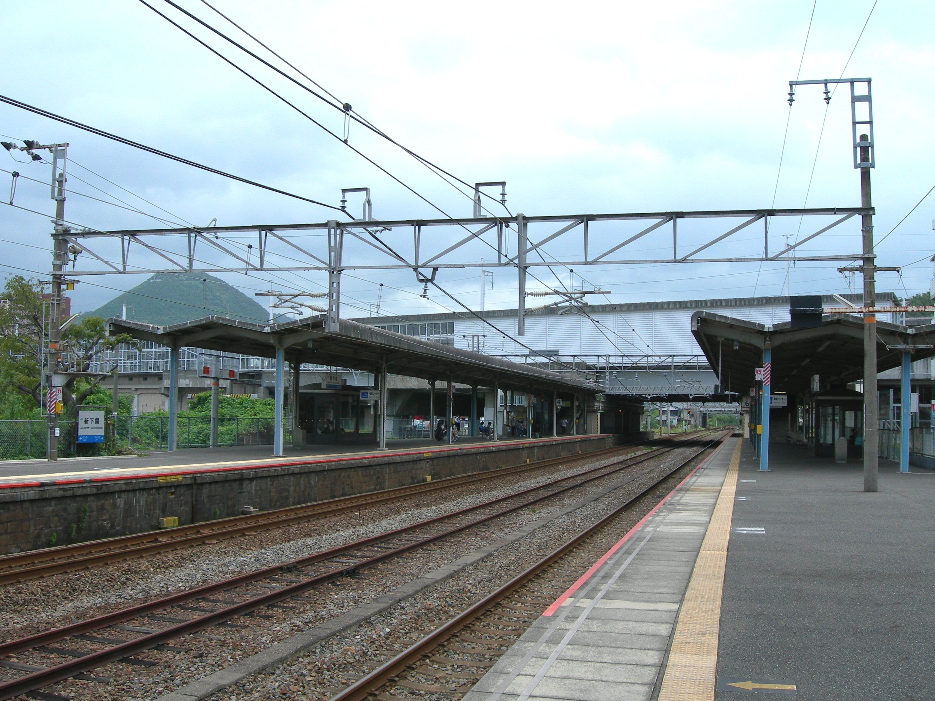 JR西日本新下関駅在来線ホーム